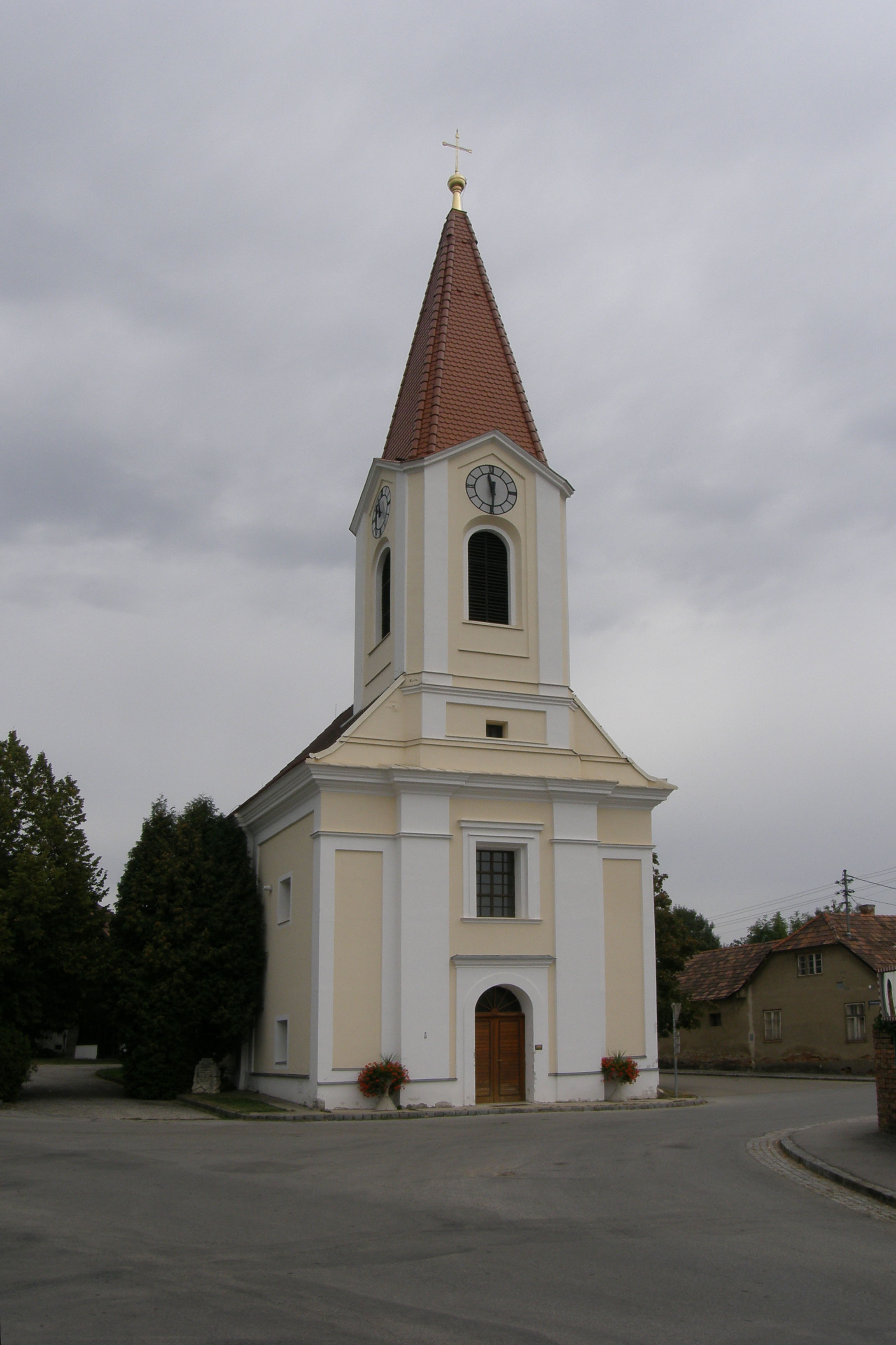 Kath. Pfarrkirche hl. Rochus